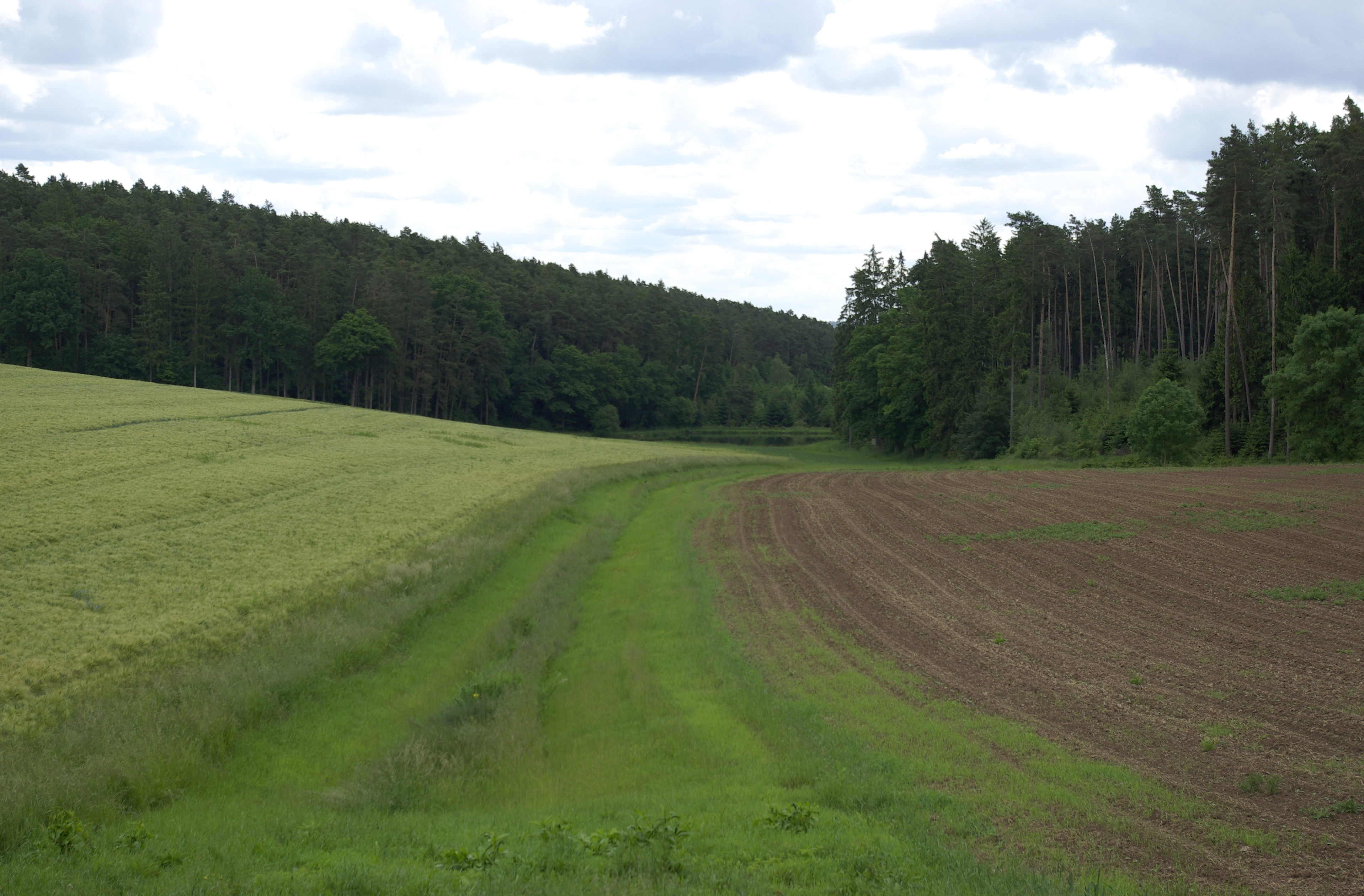 Das Tal des Klingengrabens nordöstlich von Pleikershof.